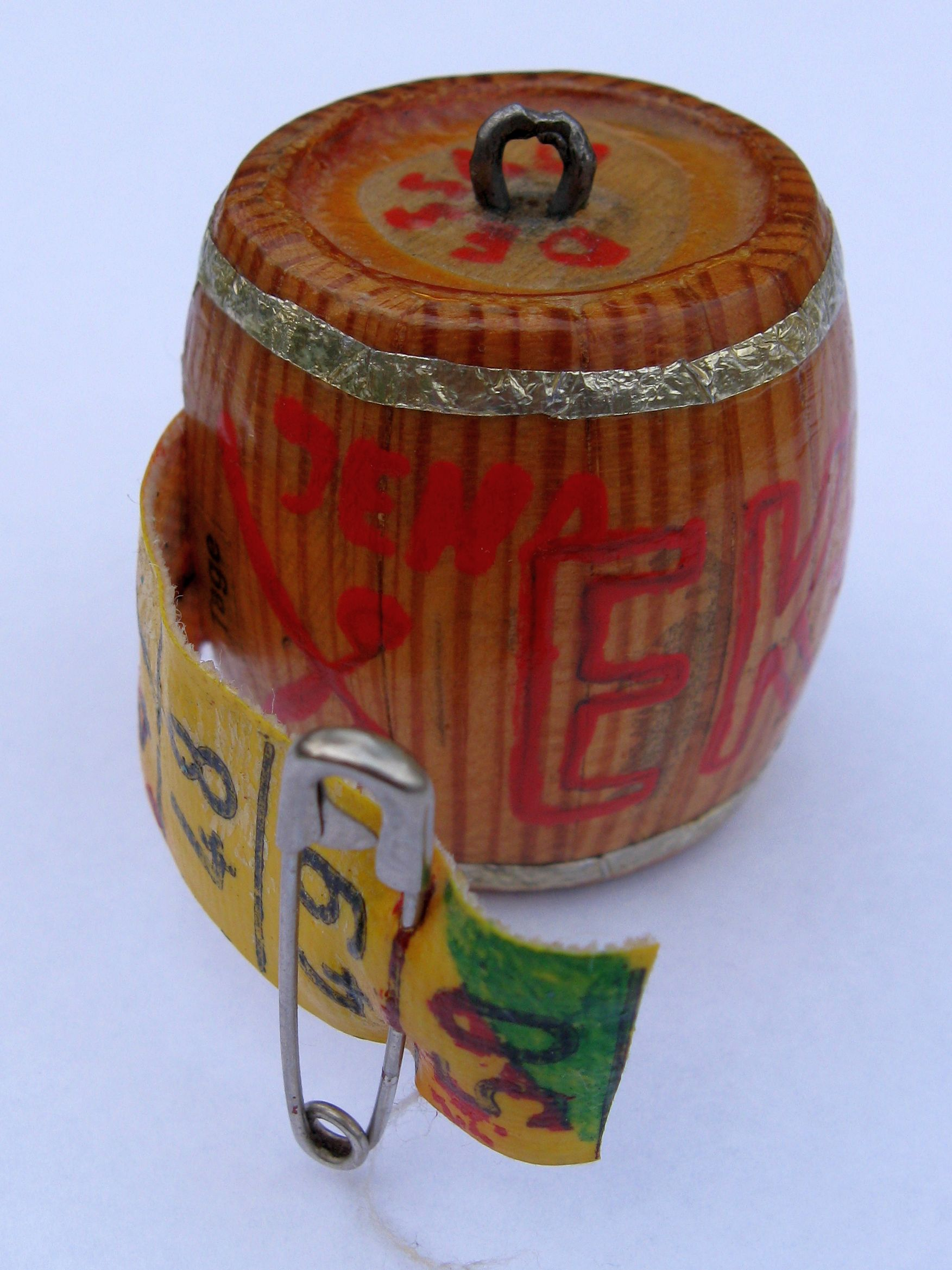 Bandmass mit Tagesmarkierungen im handgearbeiteten Holzfass eines NVA-Entlassungskandidaten 1987